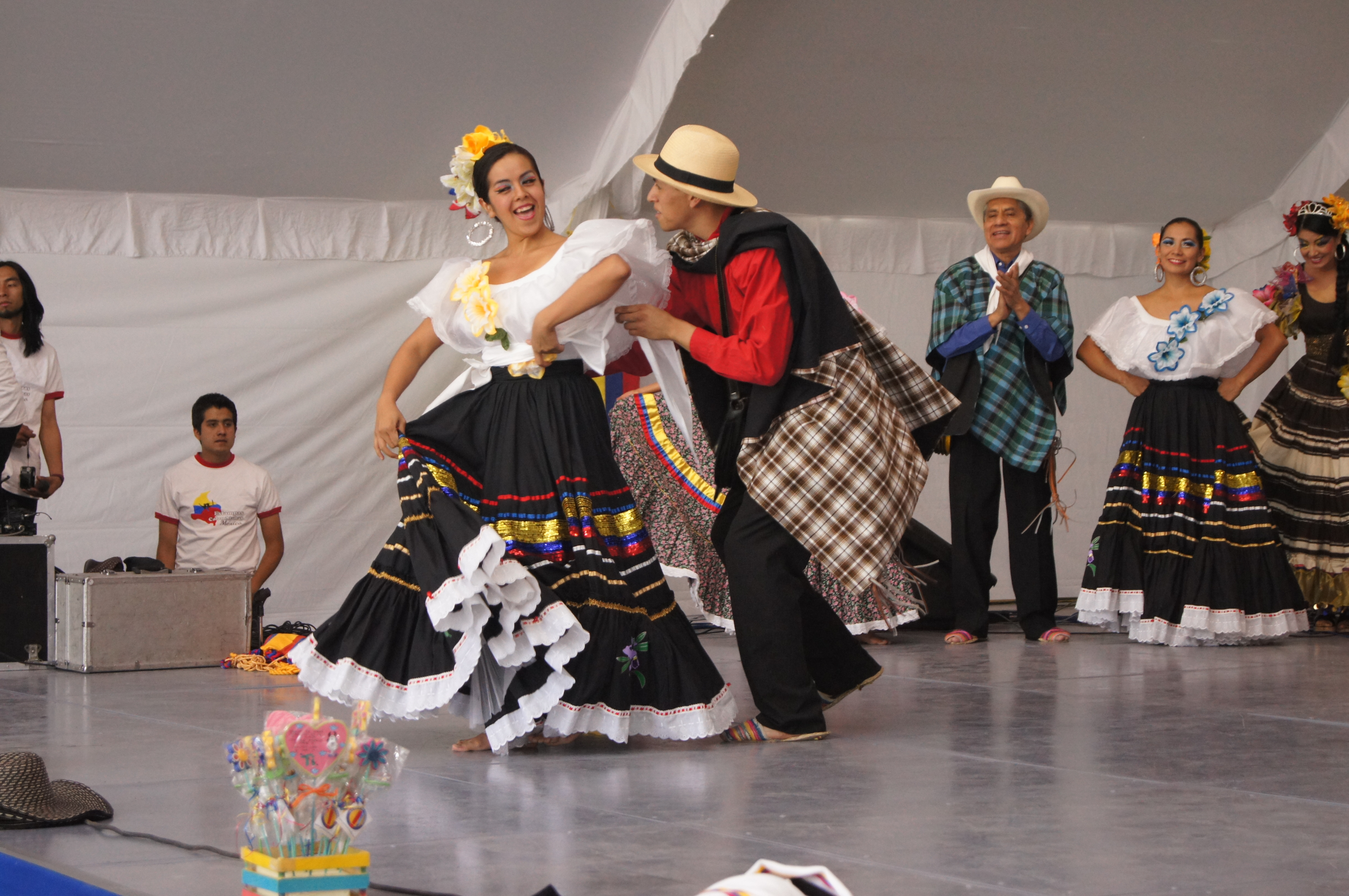 Demonstración de baile folclórico San Juanero de Colombia interpretado por Estampas Colombianas. Mexico durante el evento “Yo Amo Colombia” en ITESM Campus Ciudad de México [1]